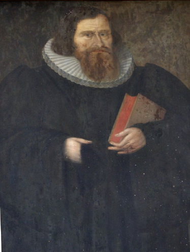 Christian Mühlmann 1582-1643 Archidiakonus in Pegau